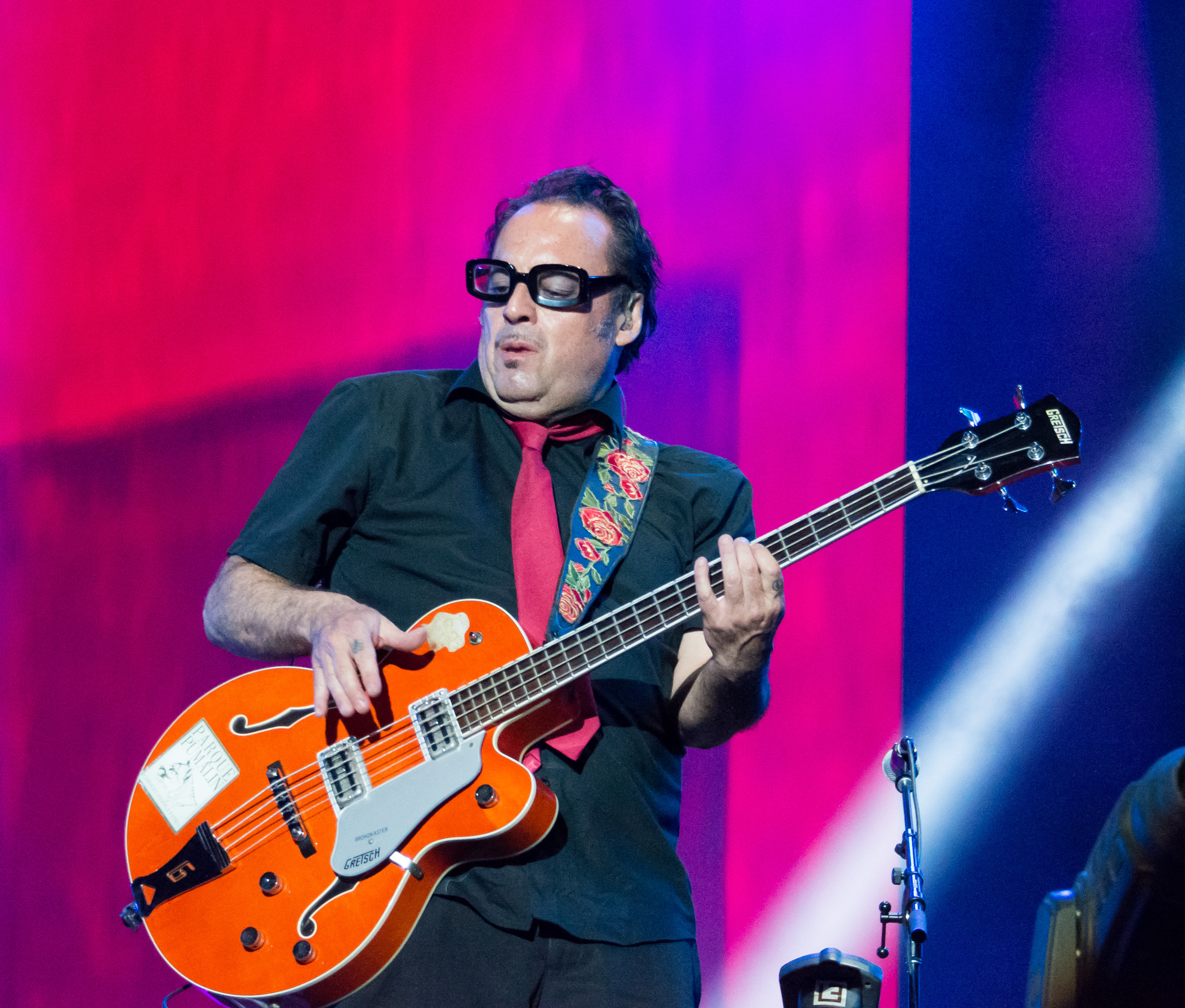 Expo Quillota 2020, Estadio Municipal Lucio Fariña Fernández, Quillota, Región de Valparaíso, Chile